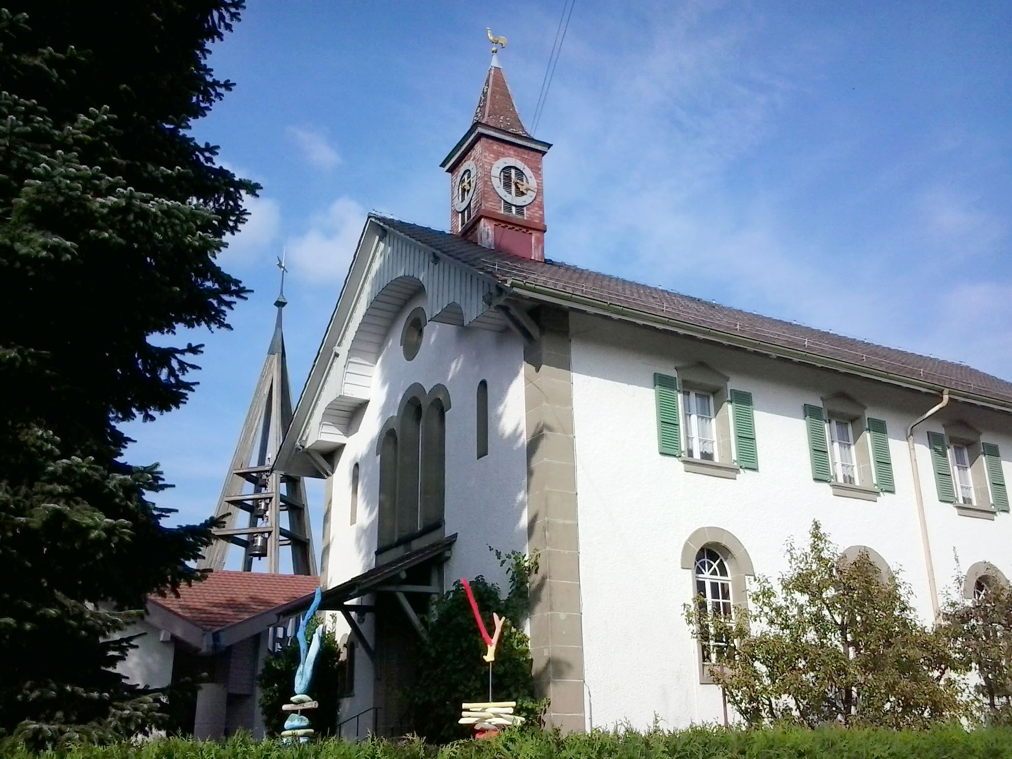 Reformierte Kirche in Cordast (Kanton Freiburg, Schweiz)